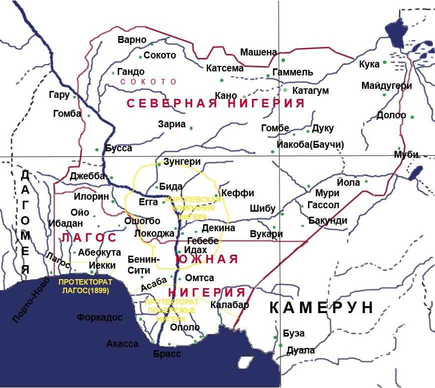 Карта Протекторатов Северная Нигерия и Южная Нигерия на 1909 год, с указанием территорий которые в 1900 году им предшествовали